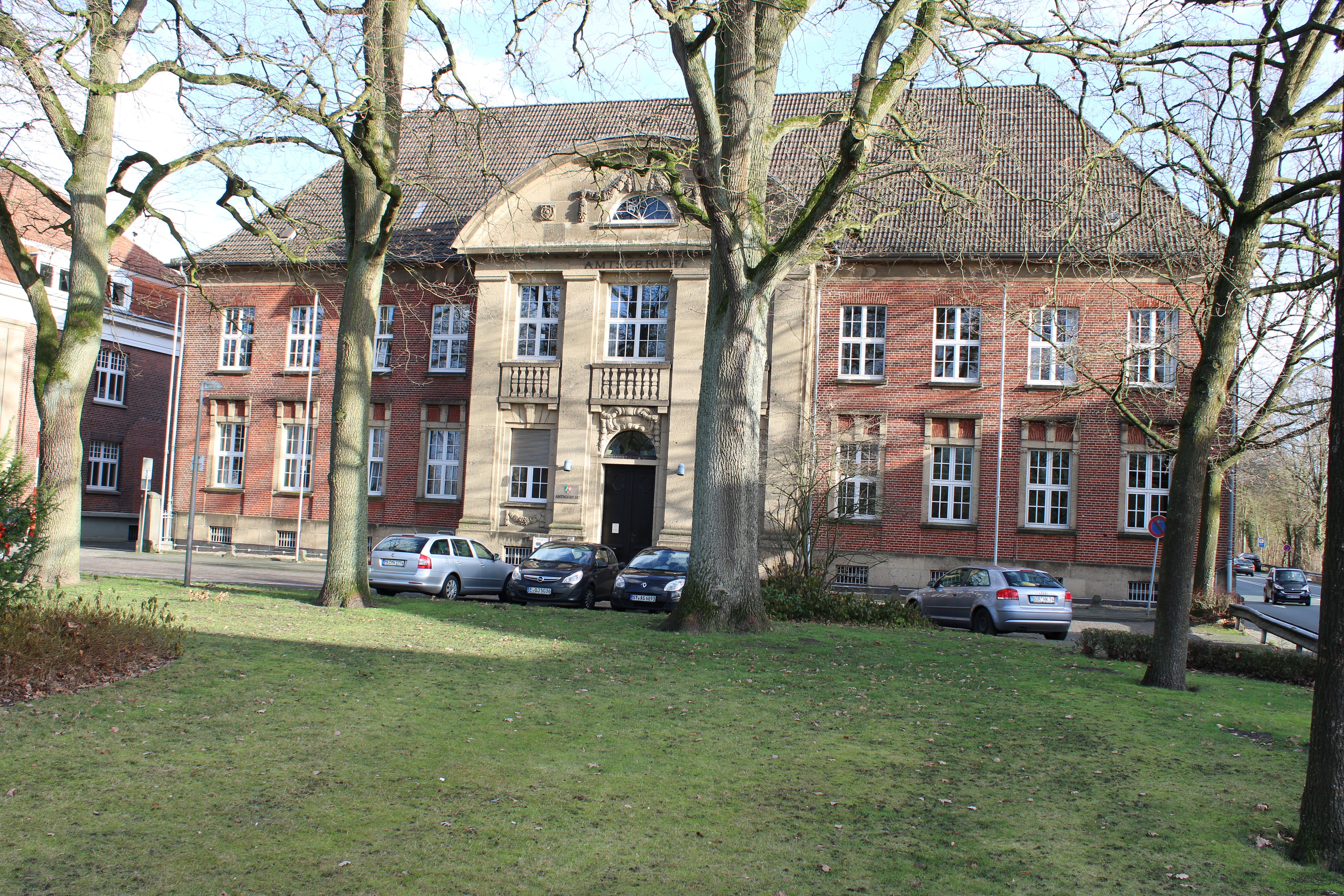 Amtsgerichtsgebäude in Gronau (Westf.)